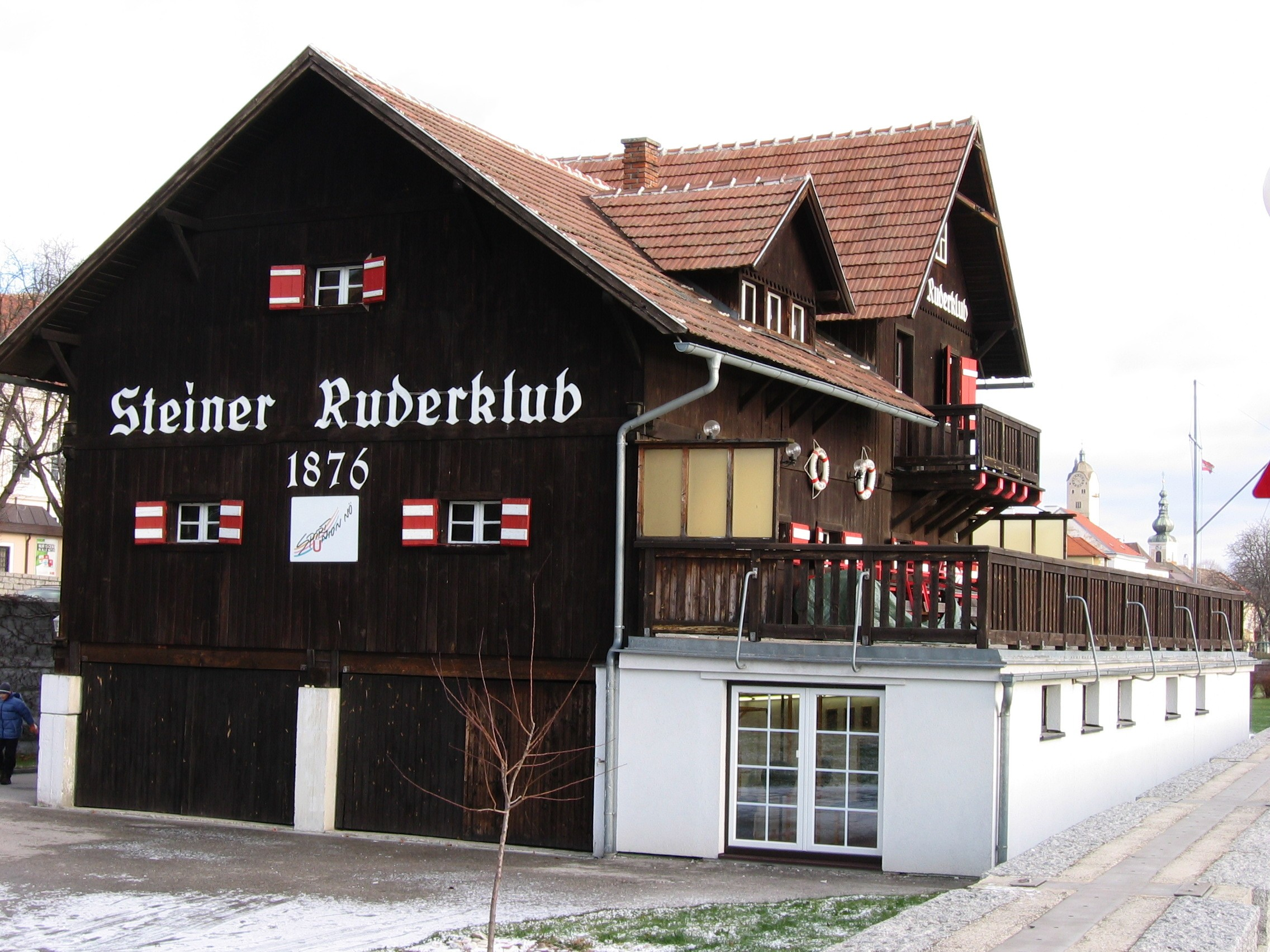 Steiner Ruderklub